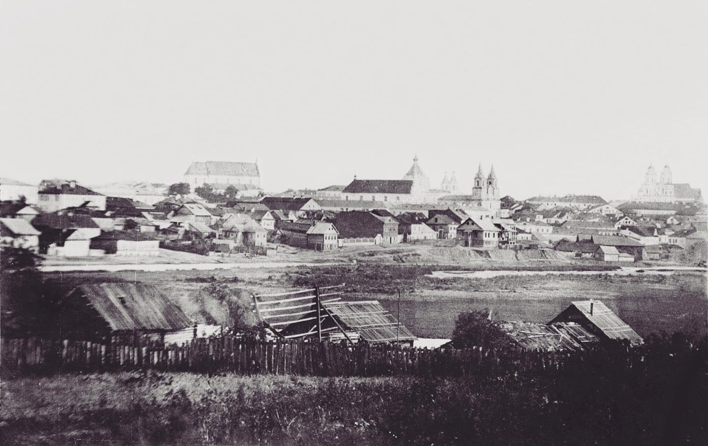 Беларуская (тарашкевіца): Менск (Miensk), Траецкаe прадмесьце (Trajeckaje pradmieściе)